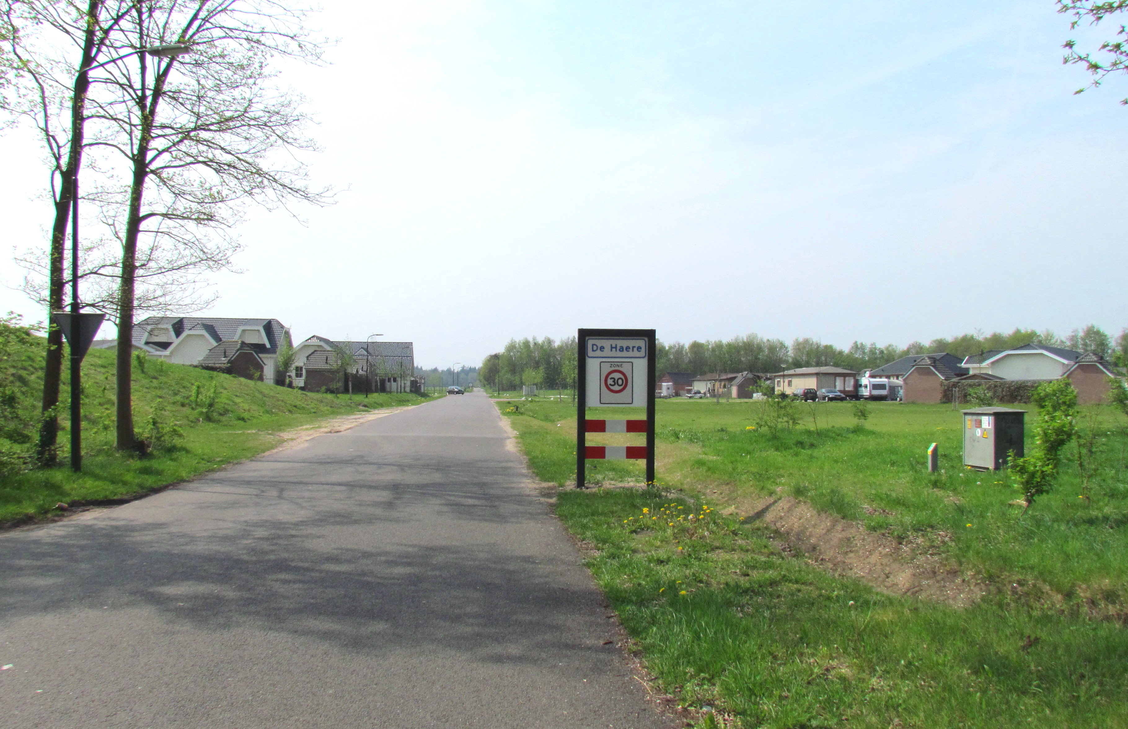 Toegang tot De Haere, een buurtschap in het uiterste noorden van de gemeente Apeldoorn (NL)